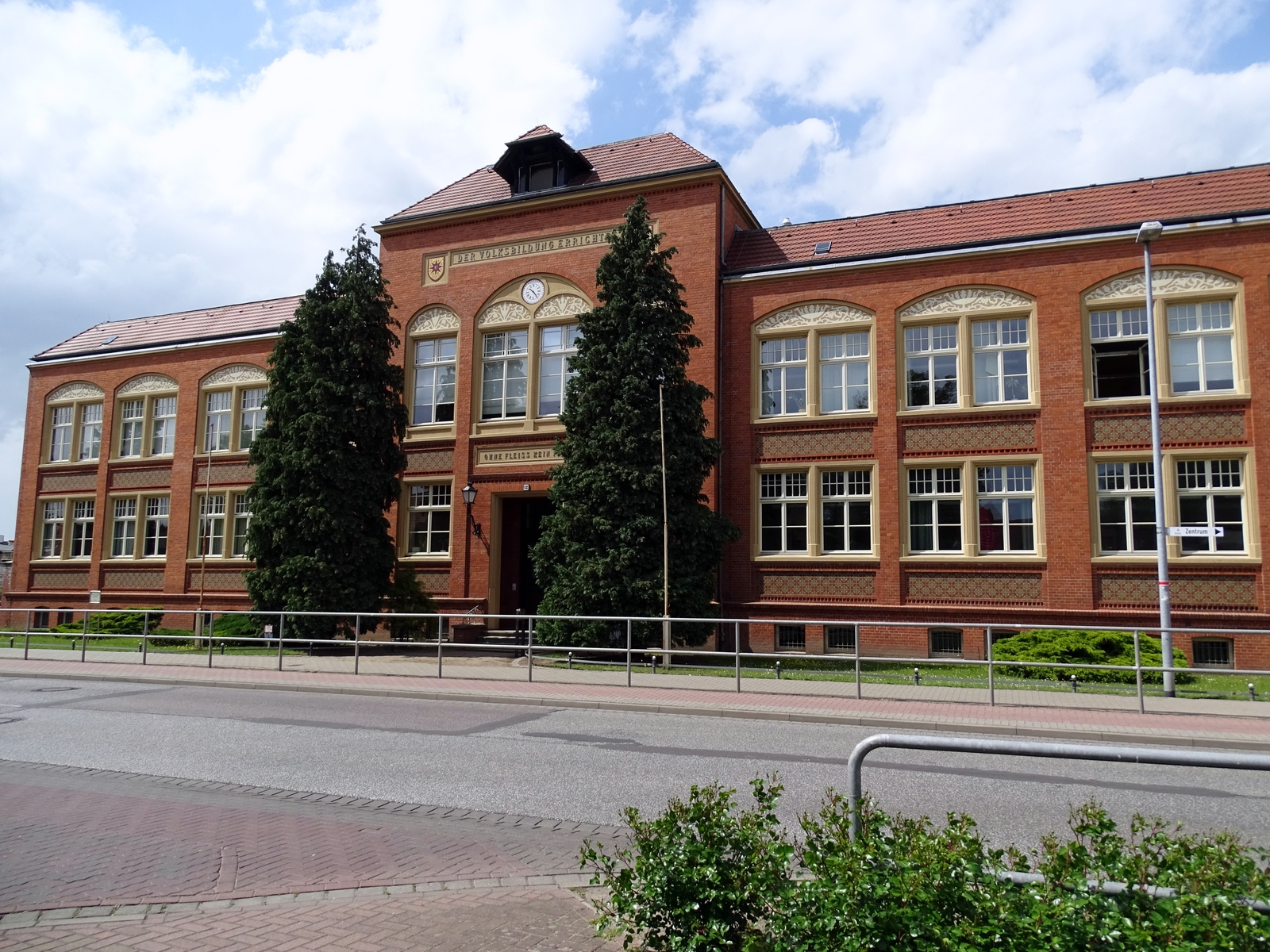 Schulgebäude Haus II in der Wilsnackerstraße für die Sekundarstufe 2 (Klassen 7-10)